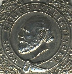 medaille